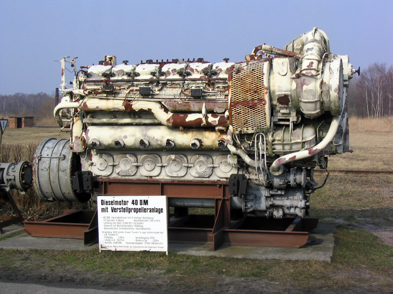 Beschreibung: Schiffsdieselmotor 40 DM mit Verstellpropelleranlage Zweitaktdiesel mit 2-stufiger Aufladung 12 Zylinder V-Motor Leistung bei Nenndrehzahl von 750 U/min: 1618 kW (2200 PS) Verwendung: MSR-Schiffen Projekt "Condor" U-Jagd-Schiffe Projekt "Hai" ausgestellt im Historisch-technischen Informationszentrum Peenemünde Author/Fotograf: Darkone, 28. Februar 2004